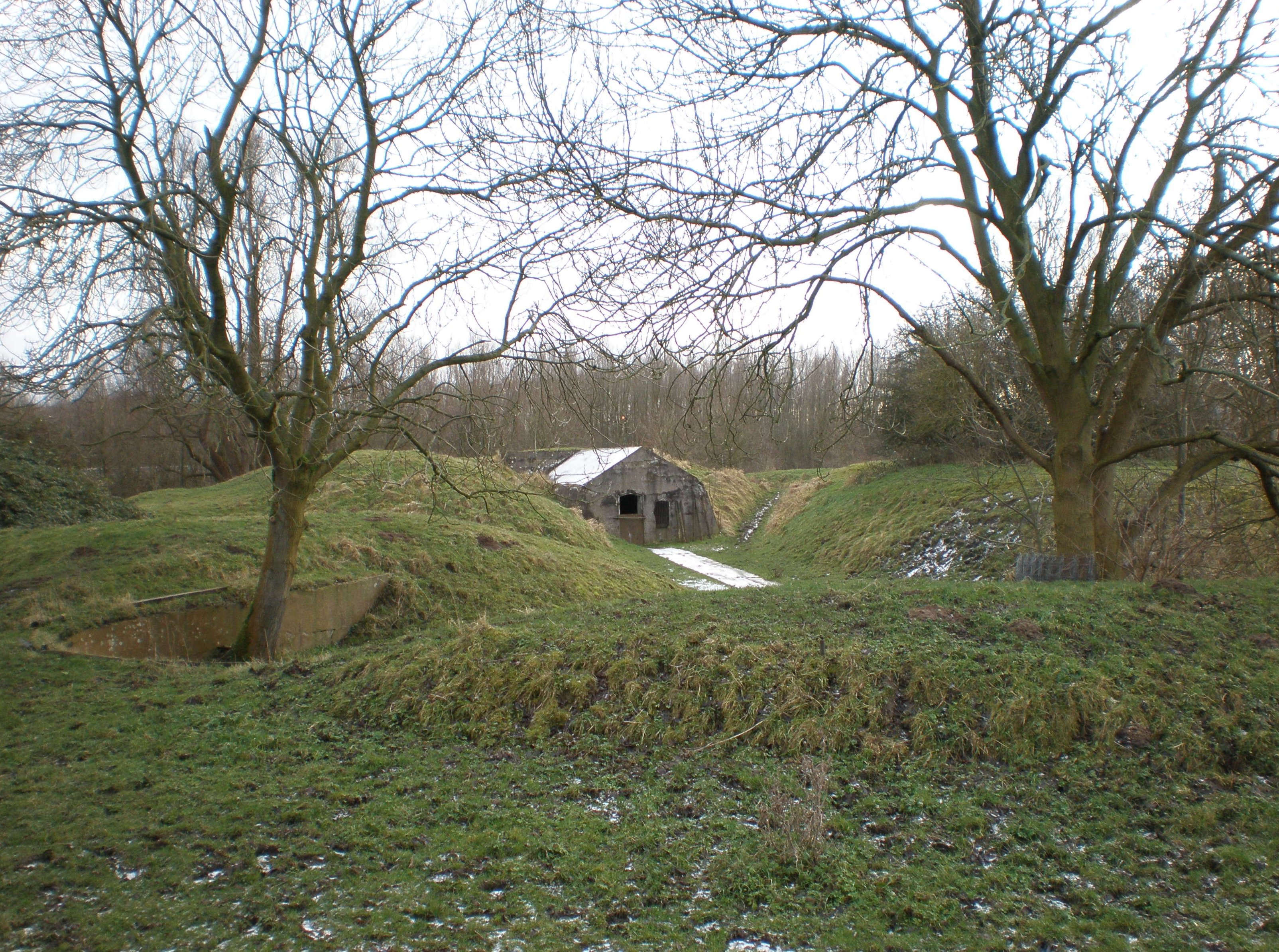 Stelling van Amsterdam: Kustbatterij bij Diemerdam